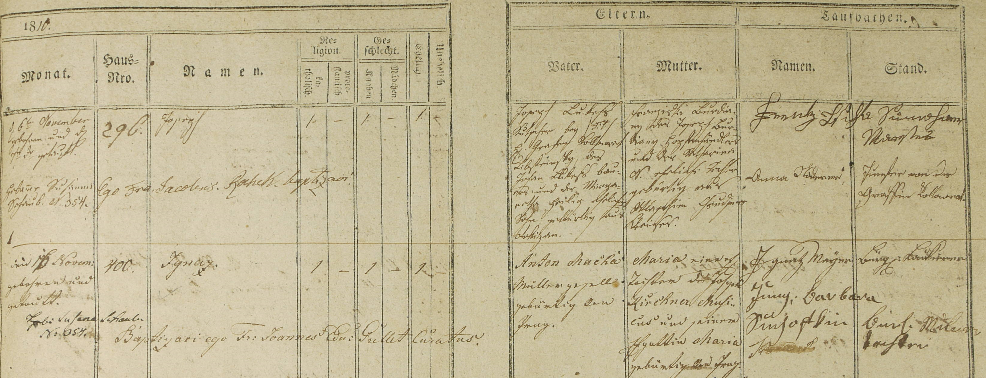 Záznam o narození Karla Hynka Máchy (tehdy ještě Ignáce) v matrice narozených.